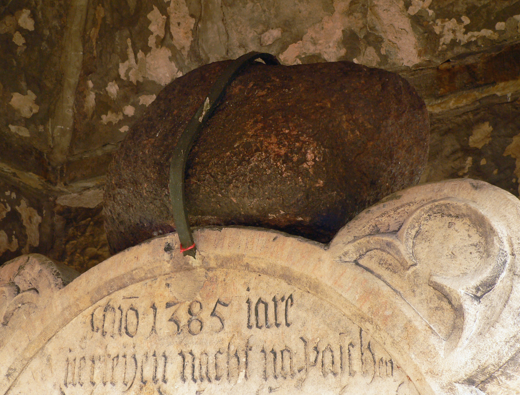 Findling auf dem Herzog-Albrecht-Denkmal